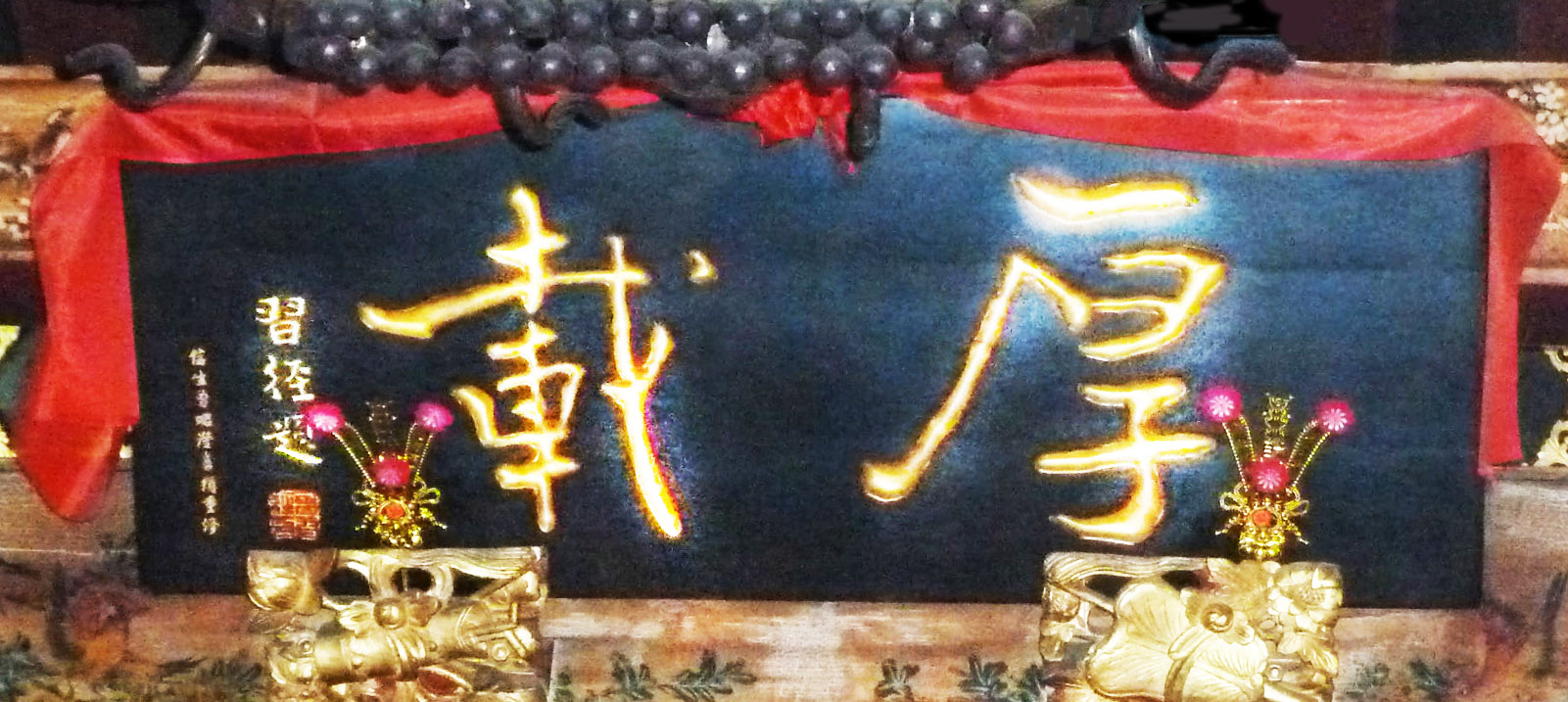 中文（台灣）: 進士第厚載